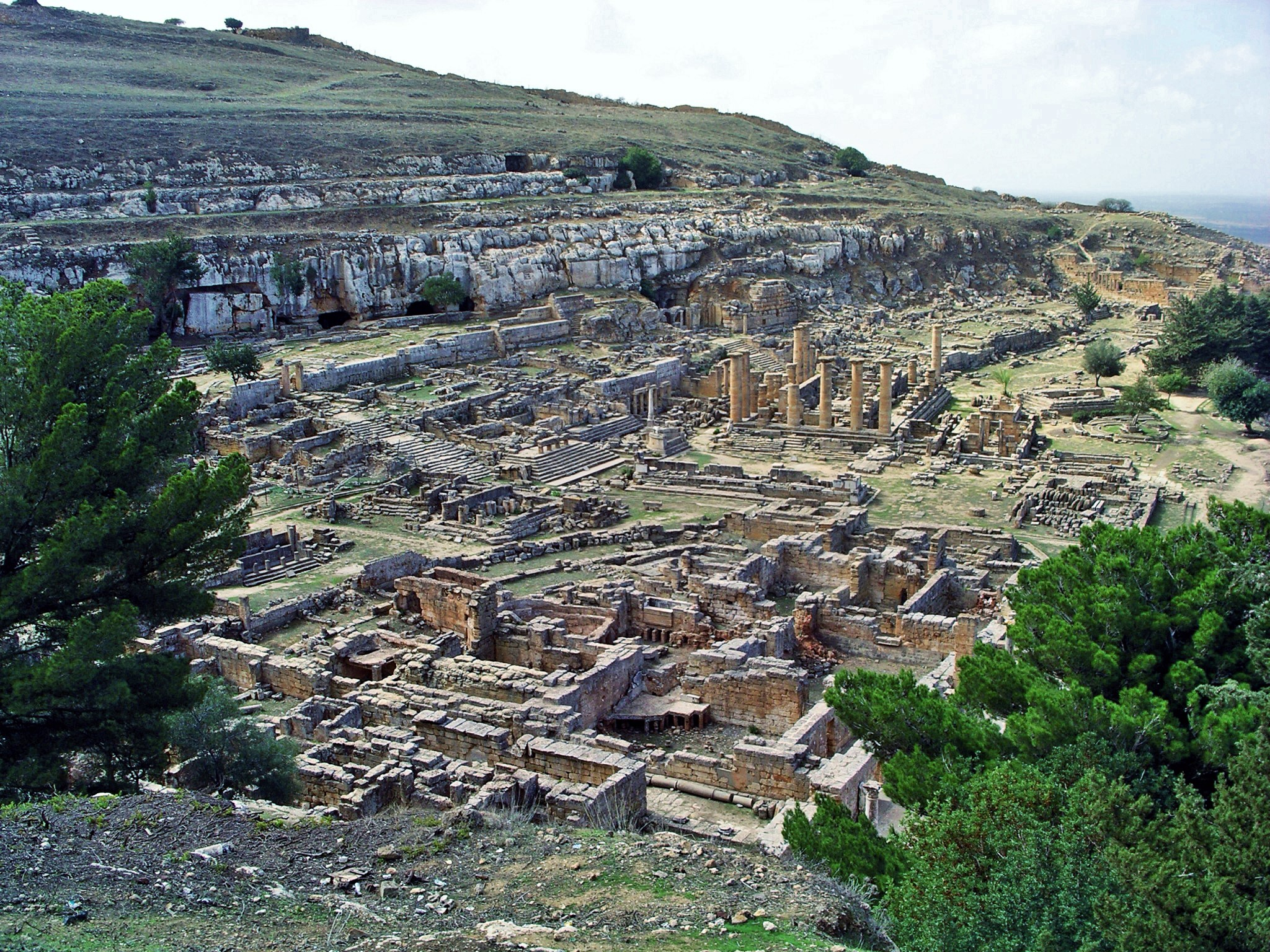 Kyrene, die alte Stadt, die Unterstadt, eine Gründung griechischer Kolonisten von der griechischen Insel Thera, die um das Jahr 630 v. Chr. erfolgt sein soll.